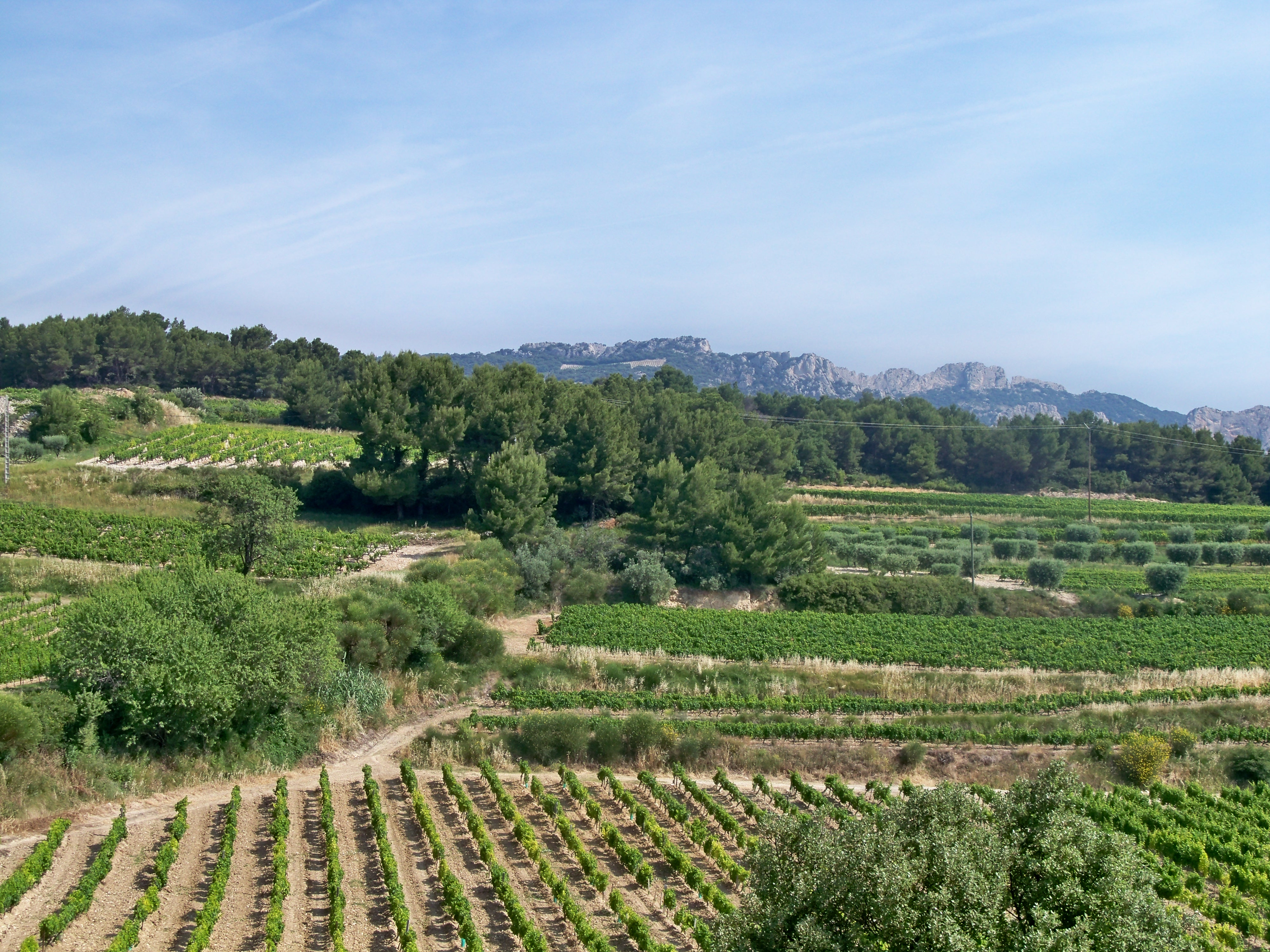 vignes de Beaumes de Venise, et vue sur les Dentelles de Montmirail